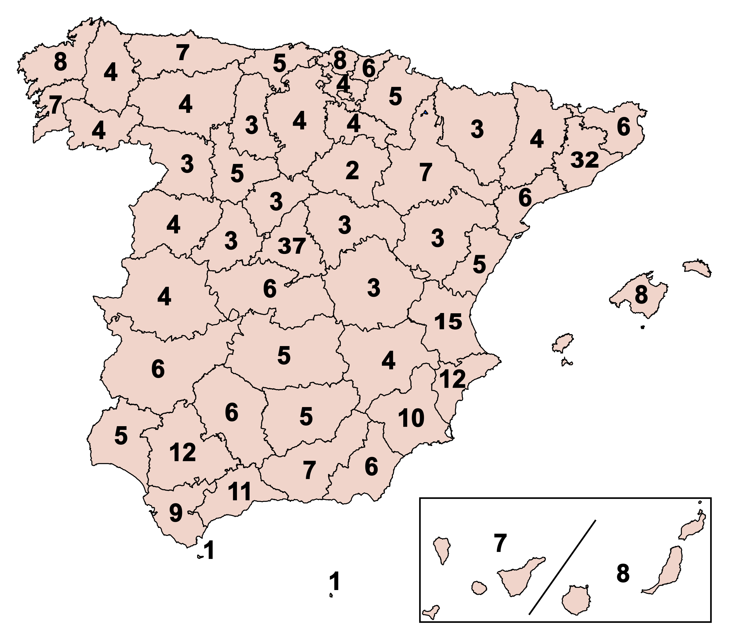 Se establecen los diputados a elegir en todas las circunscripciones de las Elecciones Generales de 2019